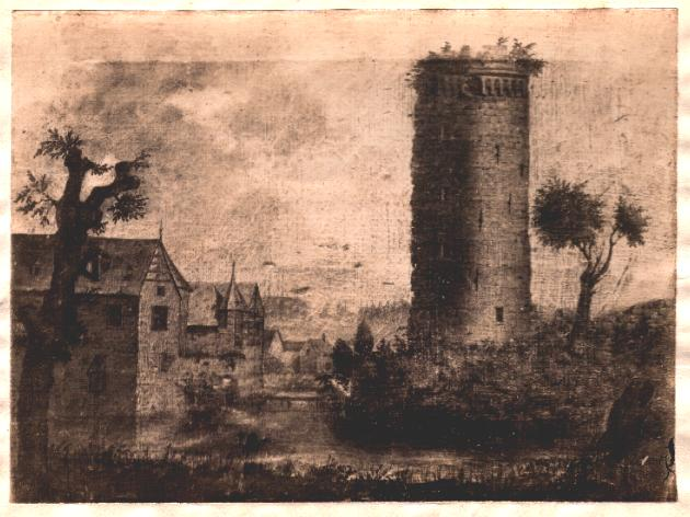 Die Bergfriedruine der Burg Schönforst in Aachen